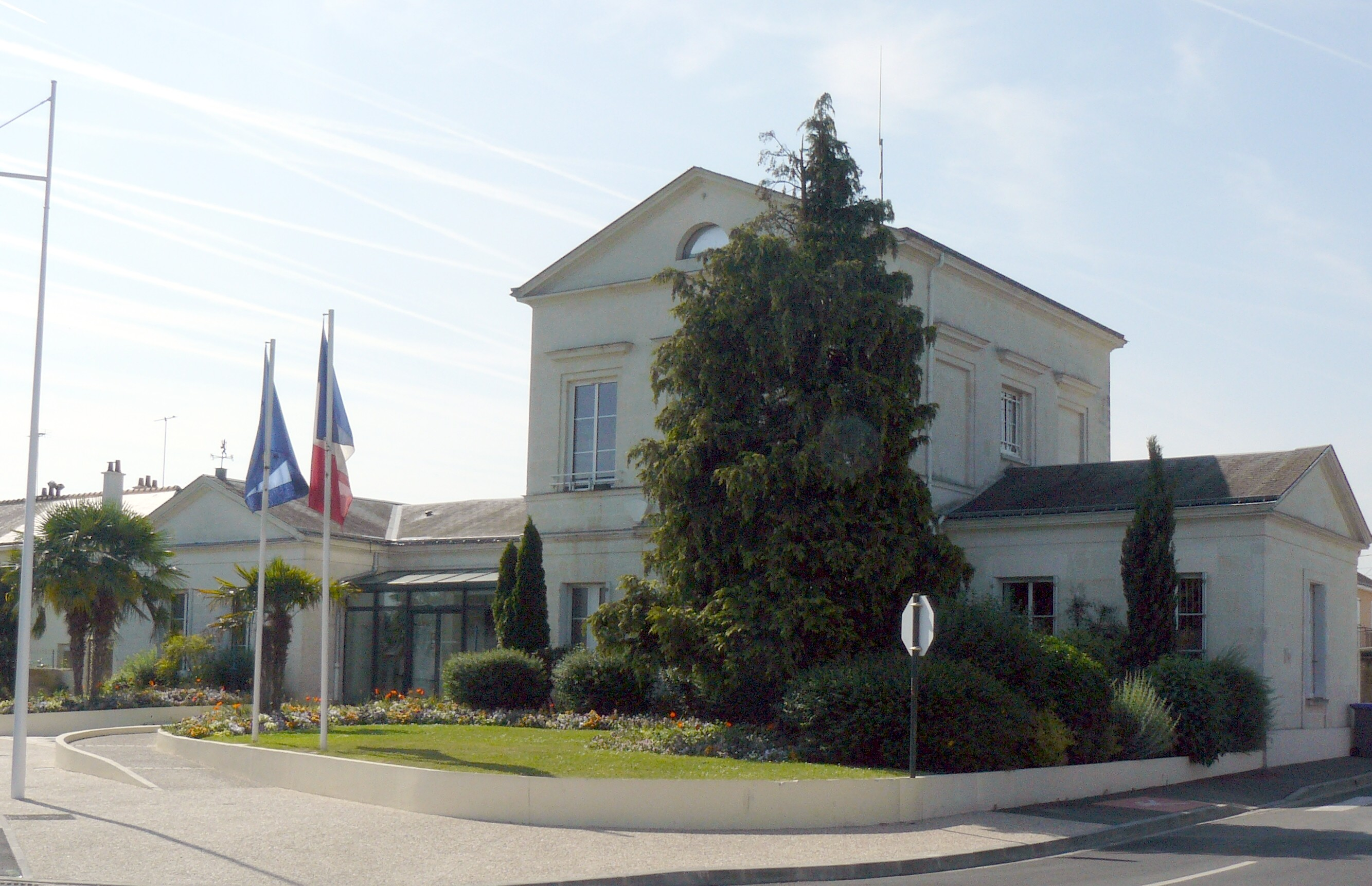 Mairie de La Ville aux Dames